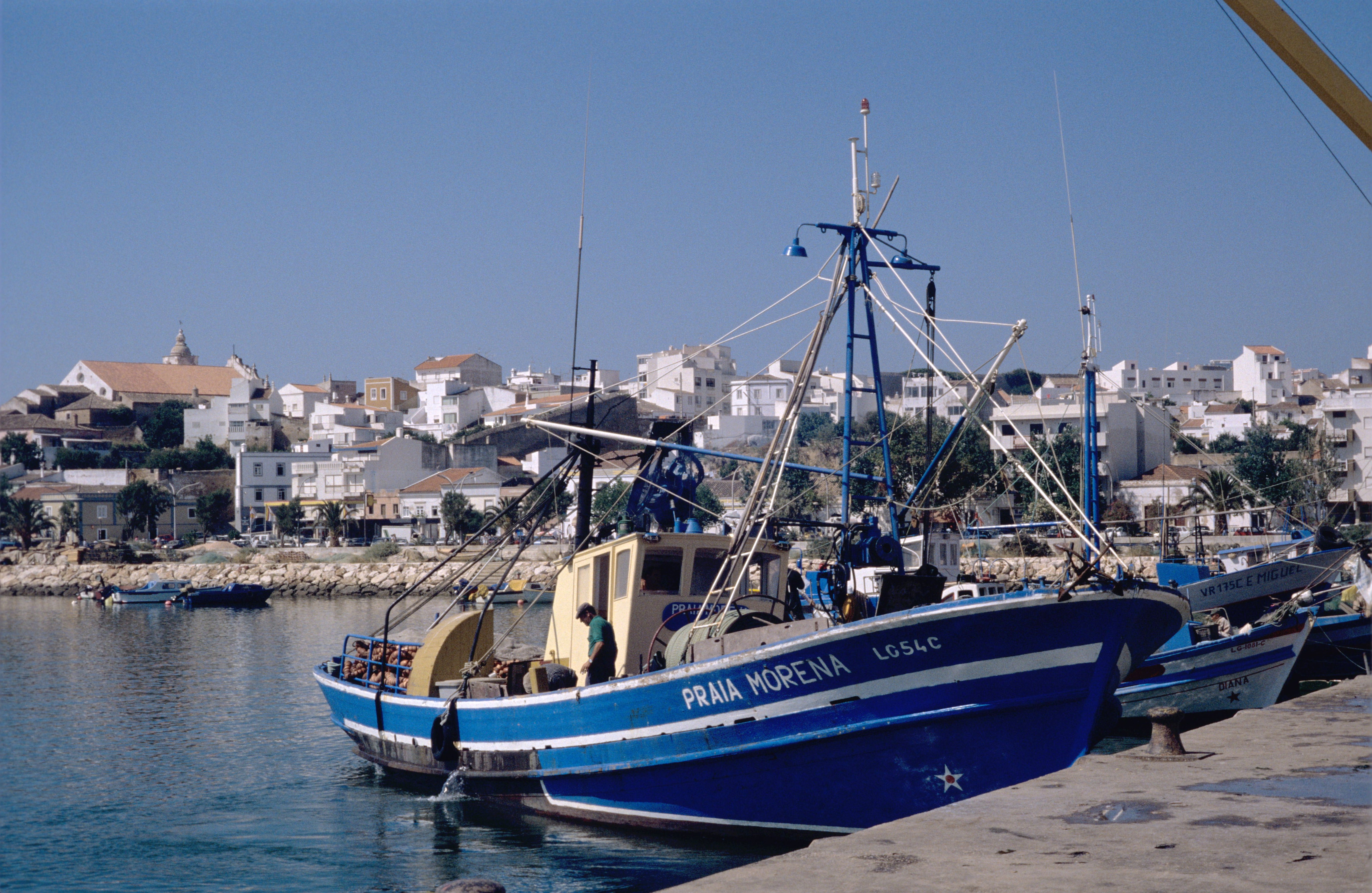 Le senneur (bolincheur) de pêche côtière "Praia Morena" ("Plage Brune") à quai dans le port de Lagos. Ce bateau de pêche a été construit en 1964 et démoli en 1993. Il mesurait 18,50 mètres de long et la puissance de son moteur était de 125 kw. Sa coque était en bois. Il était utilisé pour la pêche à la sardine. Immatriculation: LG-54-C. Lagos, Faro (Algarve), Portugal.